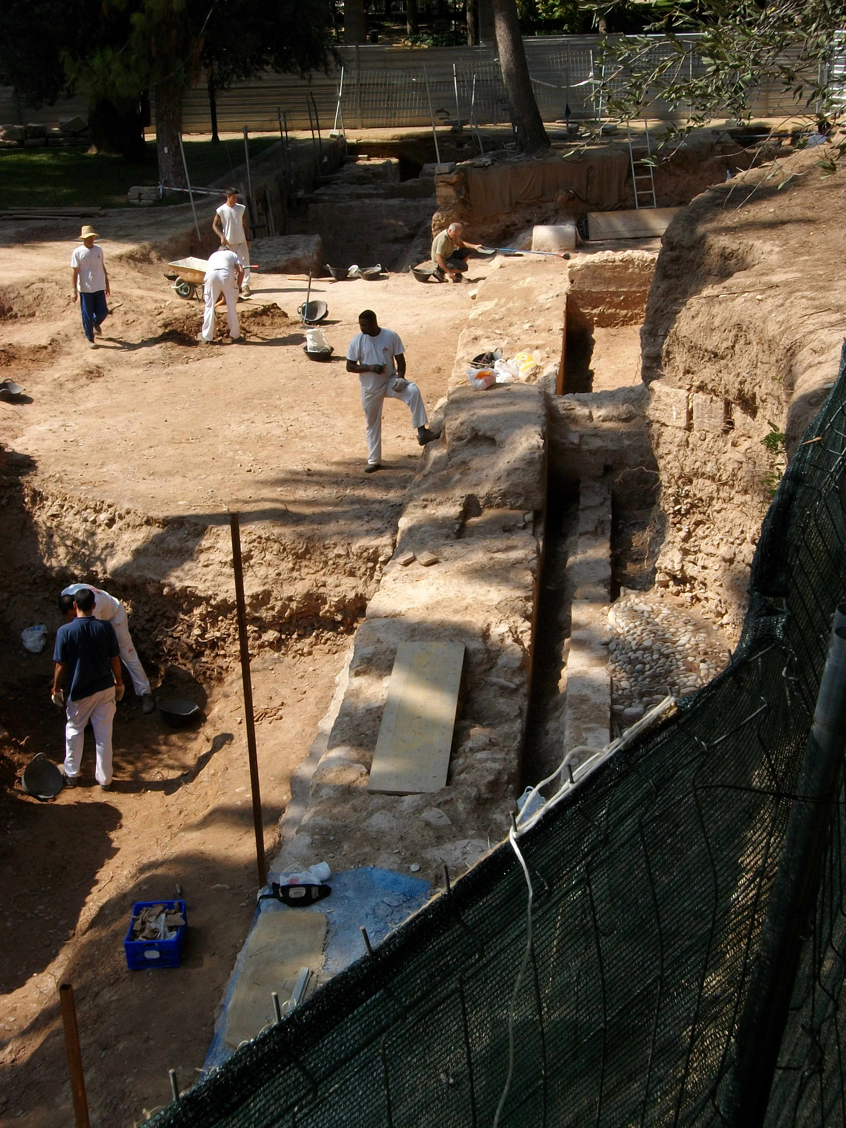 Excavació arqueològica al palau del Real de València, Jardins de Vivers 2009.